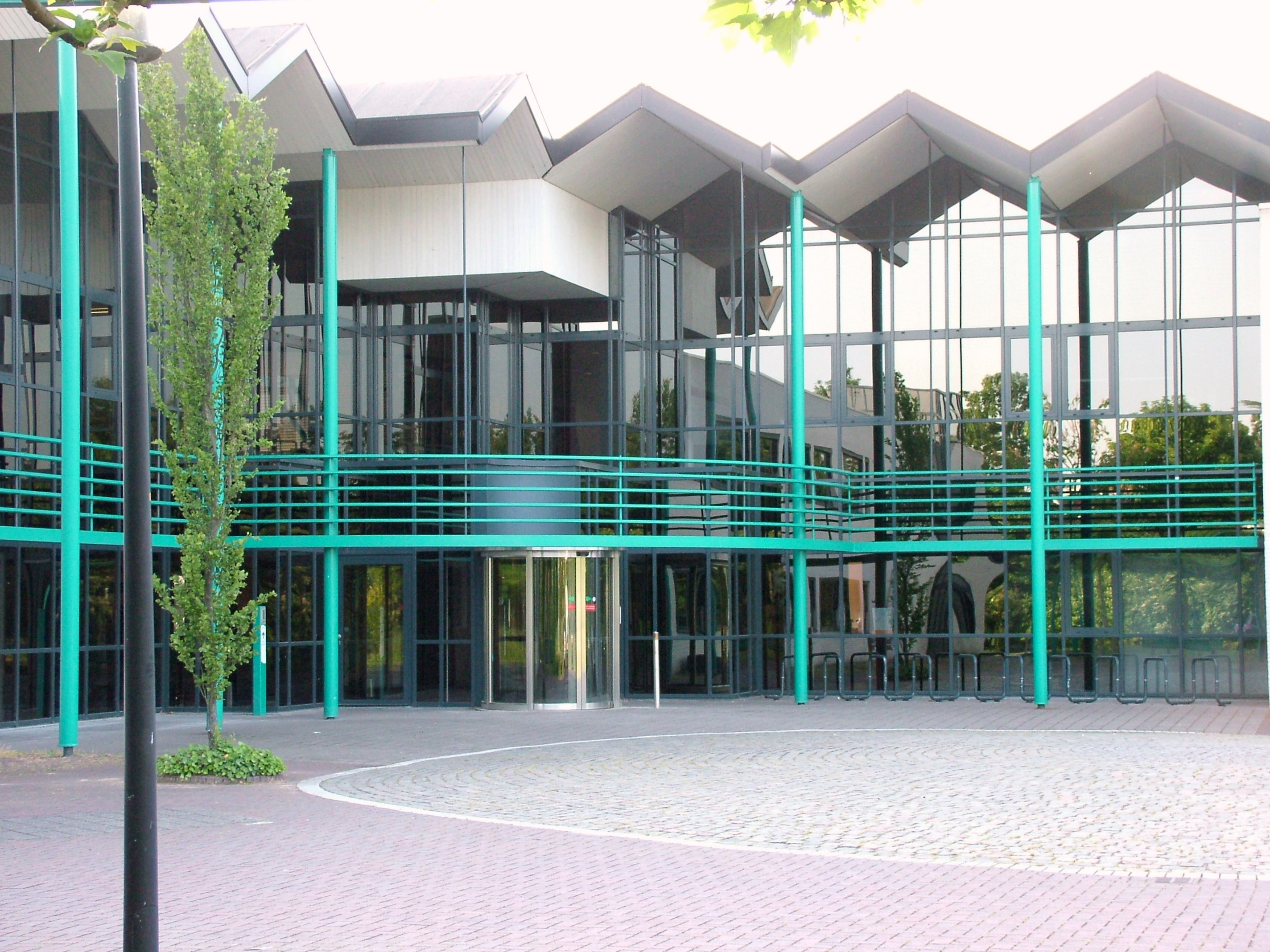 Stadhuis Oude IJsselstreek, Gendringen